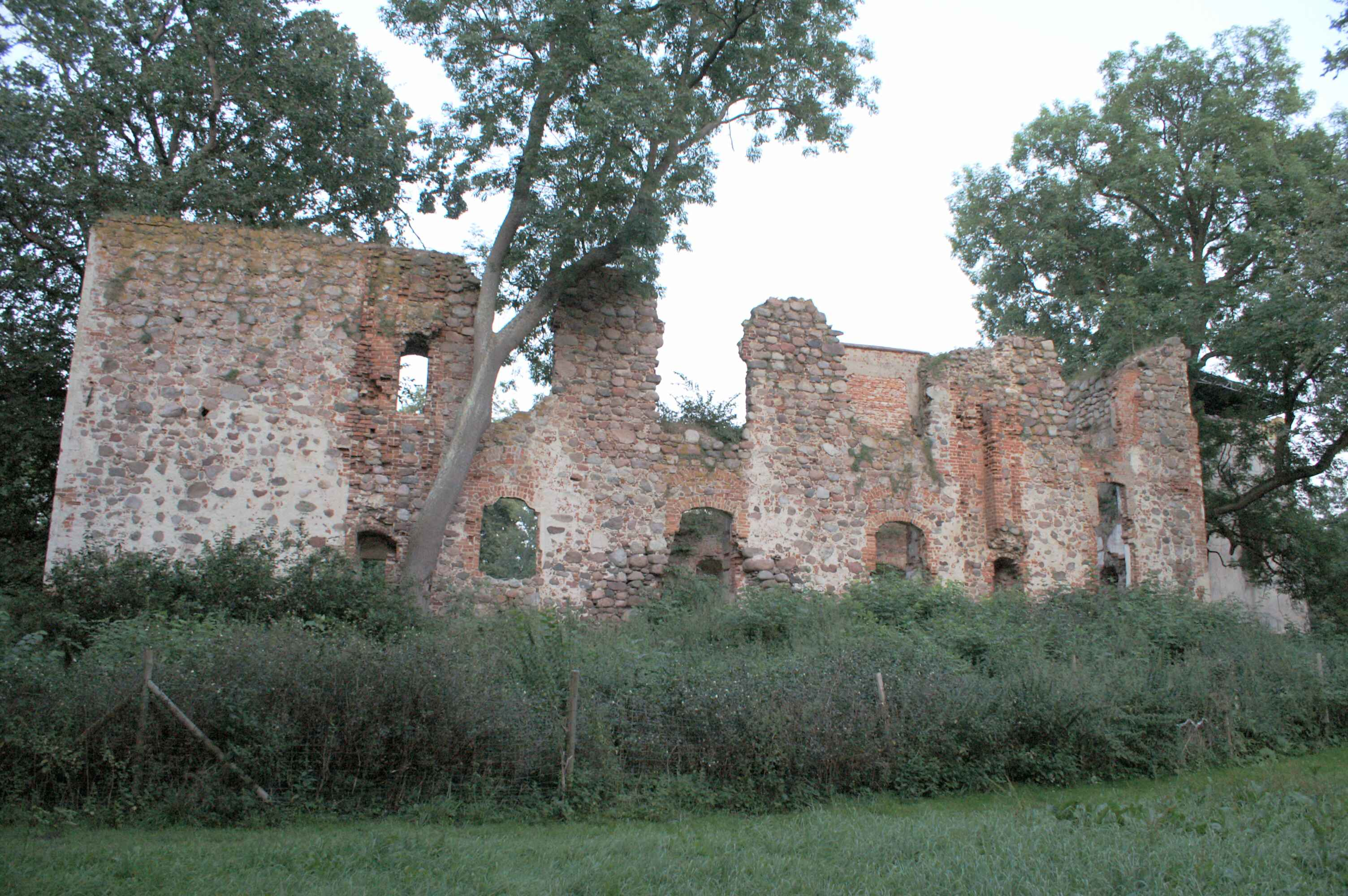 Putzar - Landkreis Ostvorpommern - Ulrichsbau - Westseite